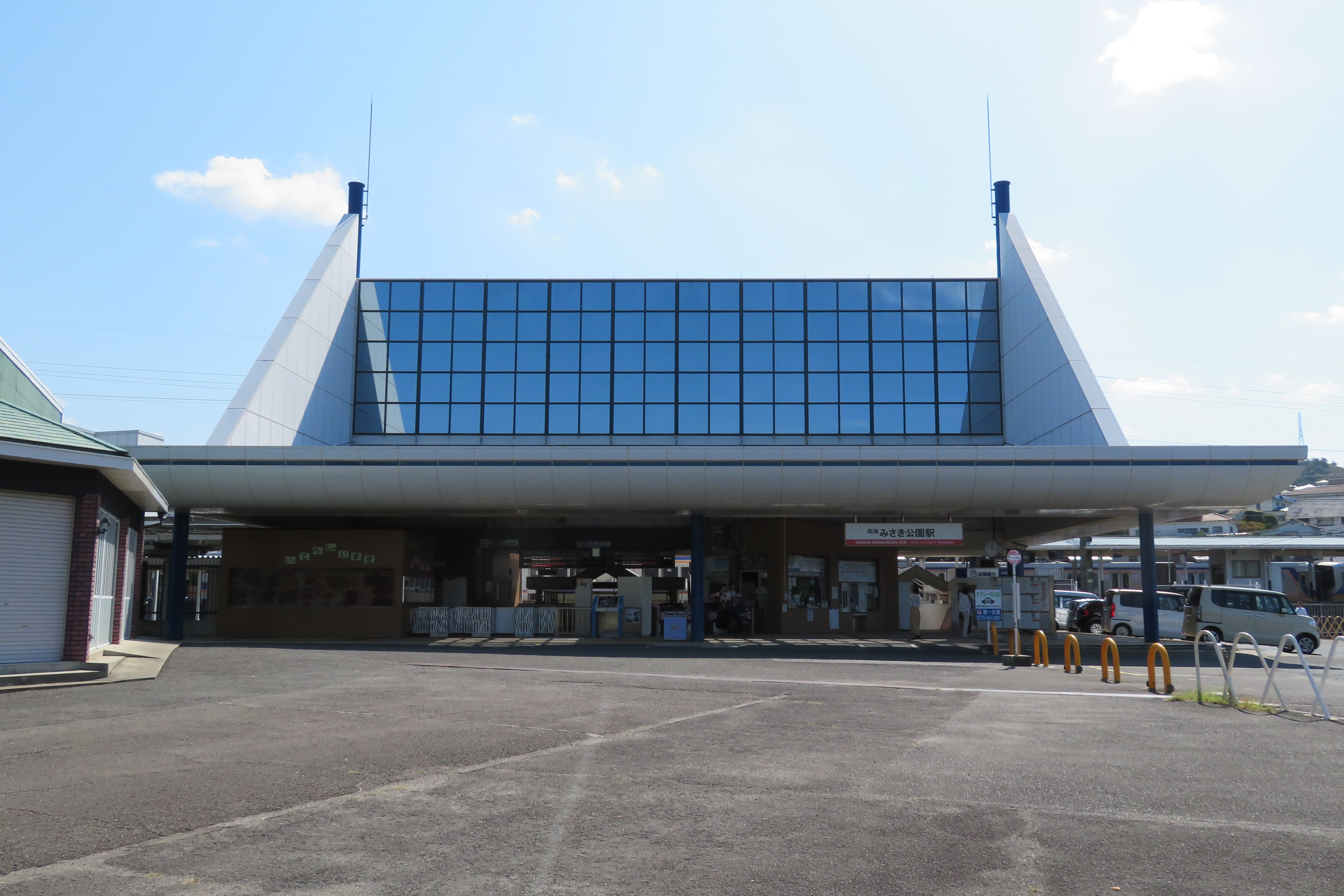 南海電鉄みさき公園駅